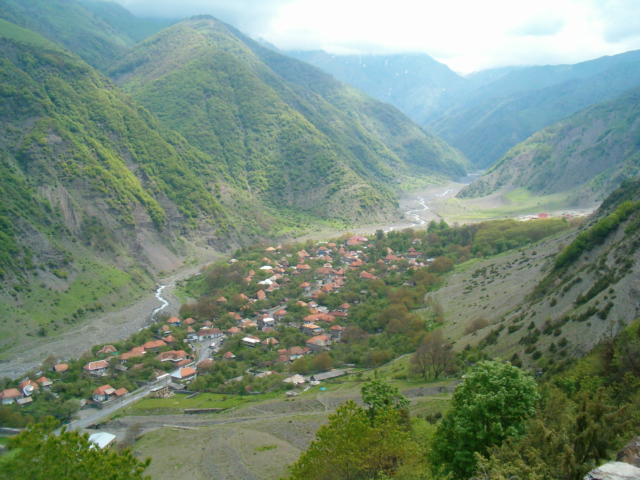 Kəndin Qalaçadan görünüşü